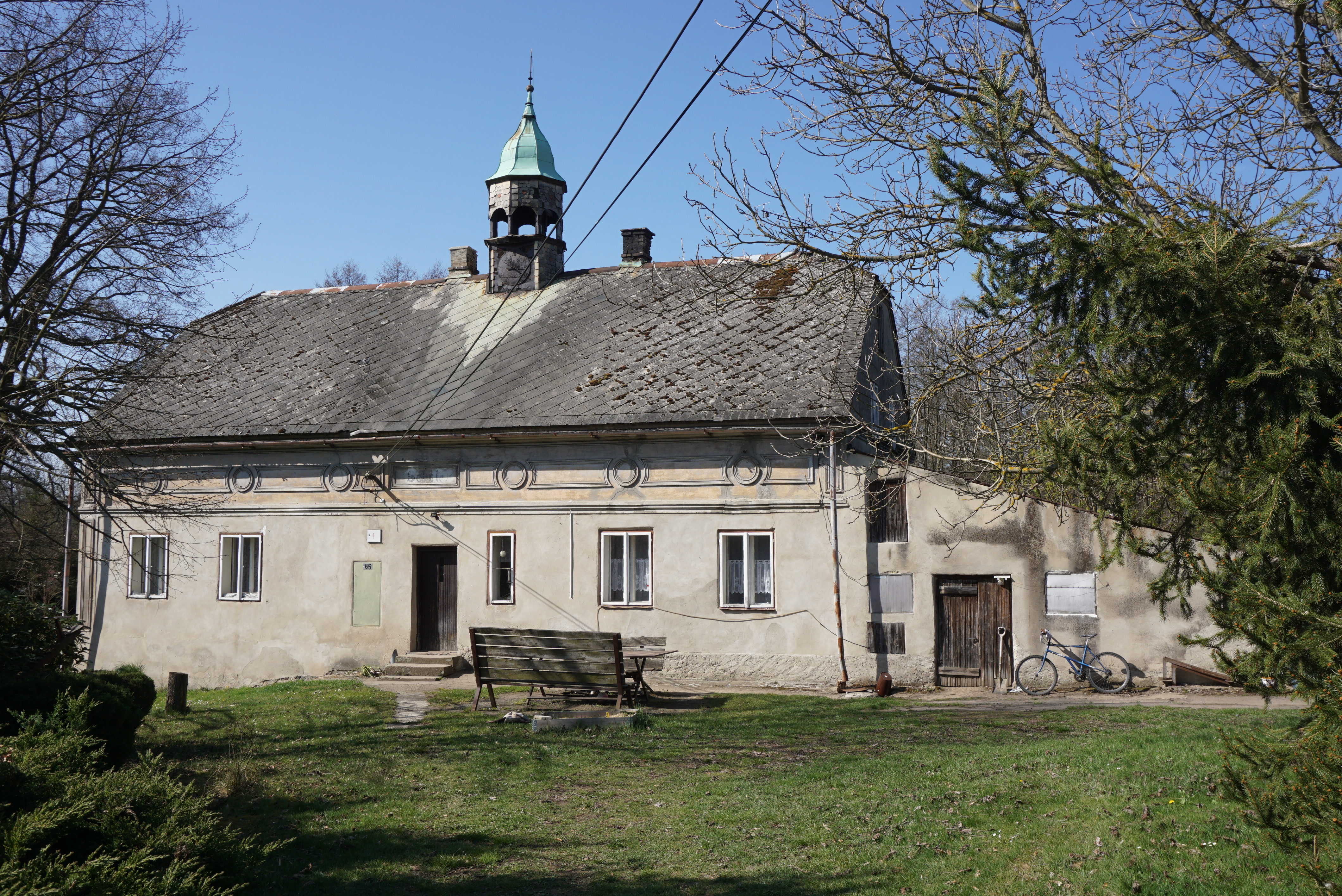 Škola, Nová Ves 65, Nová Ves (Volfartice).